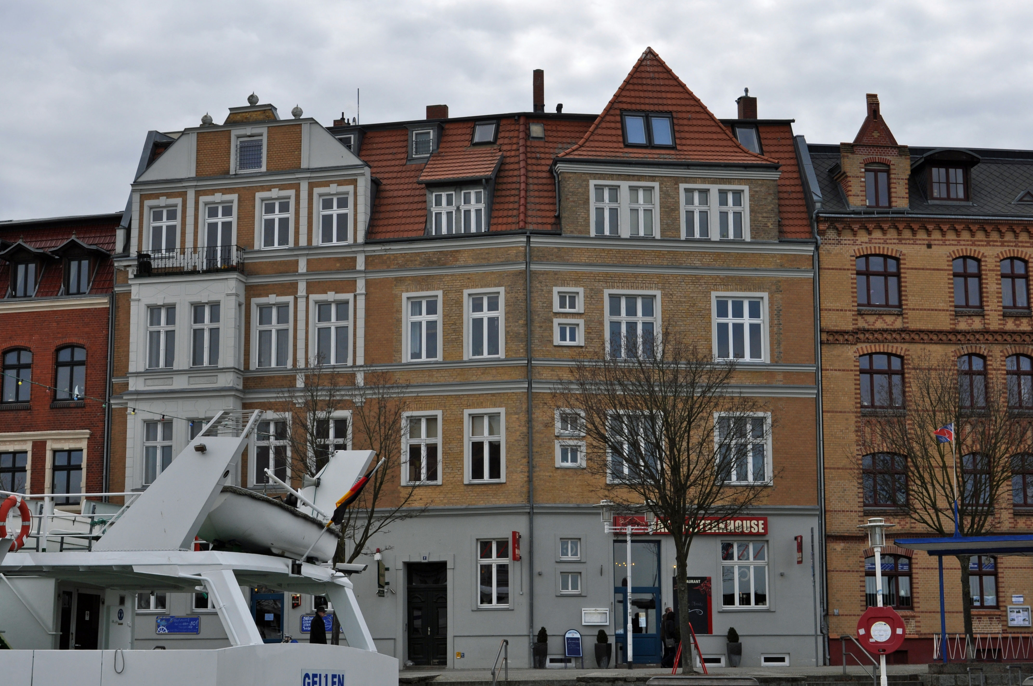 Gebäude bzw. Gebäudedetail in Stralsund. Straße und Hausnummer siehe Dateiname.